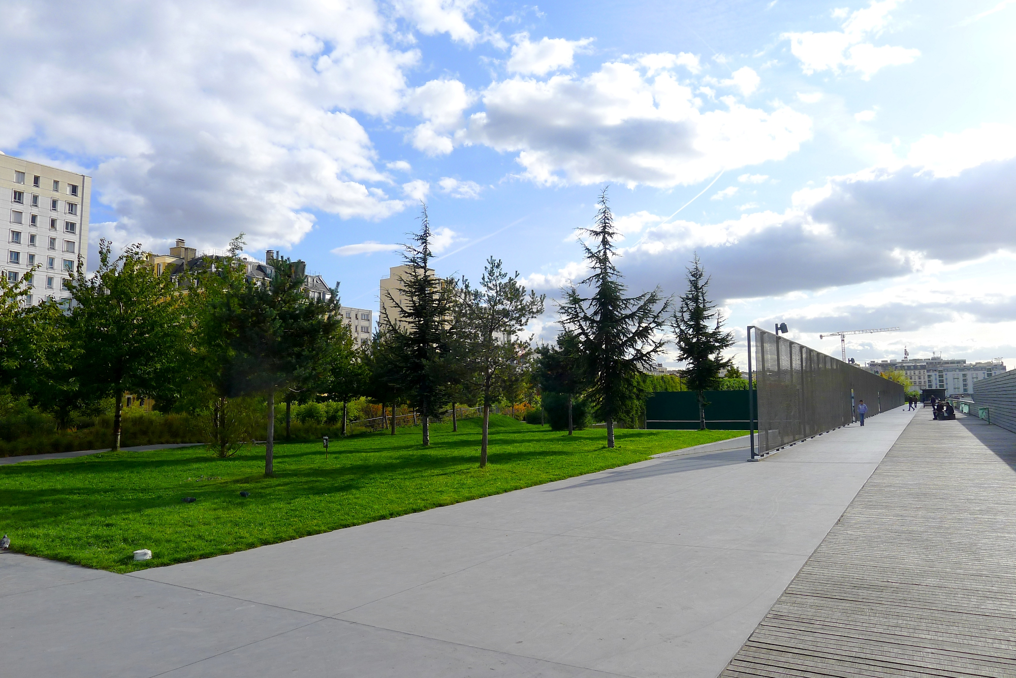 Jardins d'Eole - Paris XVIII